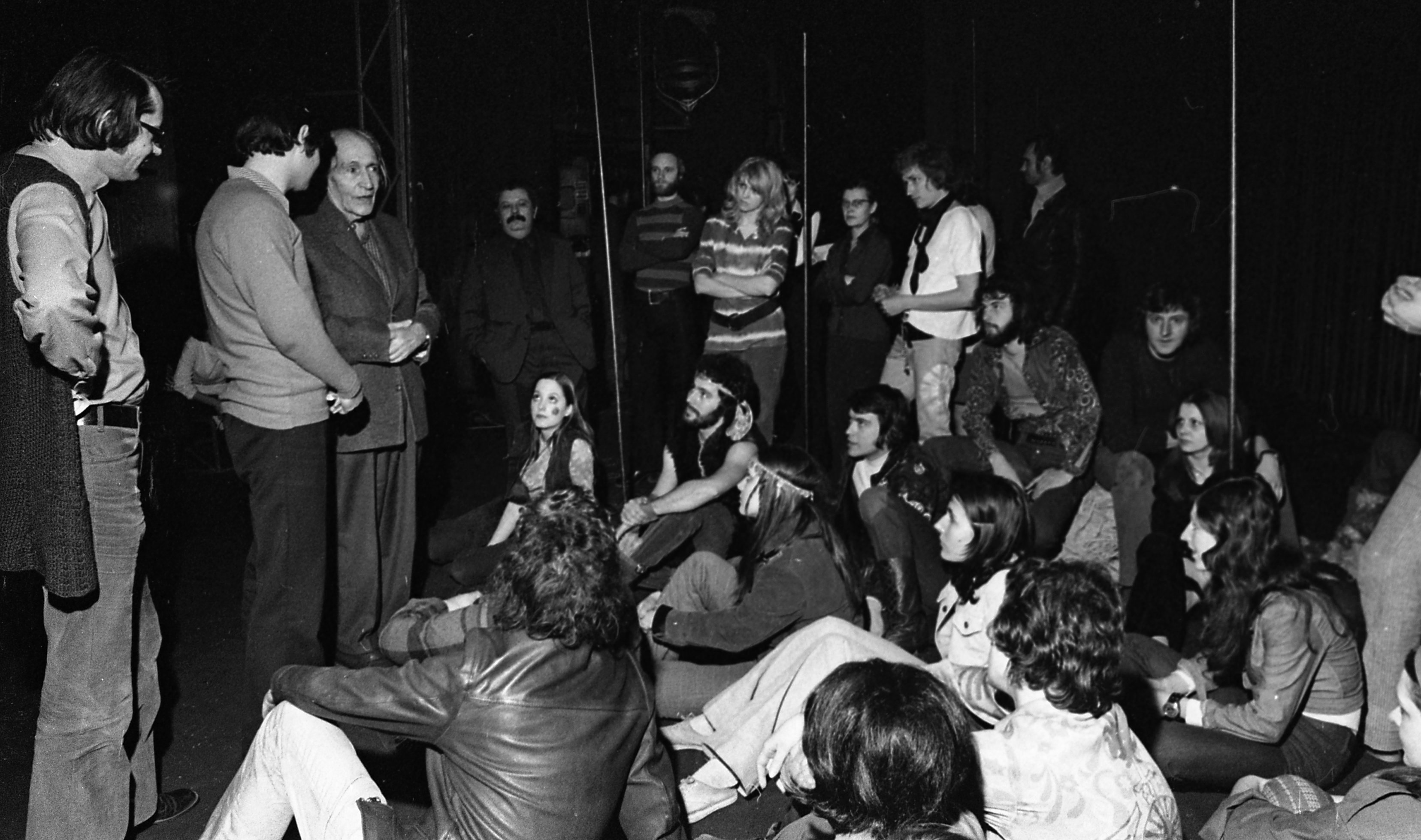 Vígszínház, a Képzelt riport egy amerikai popfesztiválról című musical szereplői, középen az író, Déry Tibor, mellette a rendező, Marton László. Location: Hungary, Budapest XIII. Tags: Budapest Title: Vígszínház, a Képzelt riport egy amerikai popfesztiválról című musical szereplői, középen az író, Déry Tibor, mellette a rendező, Marton László.